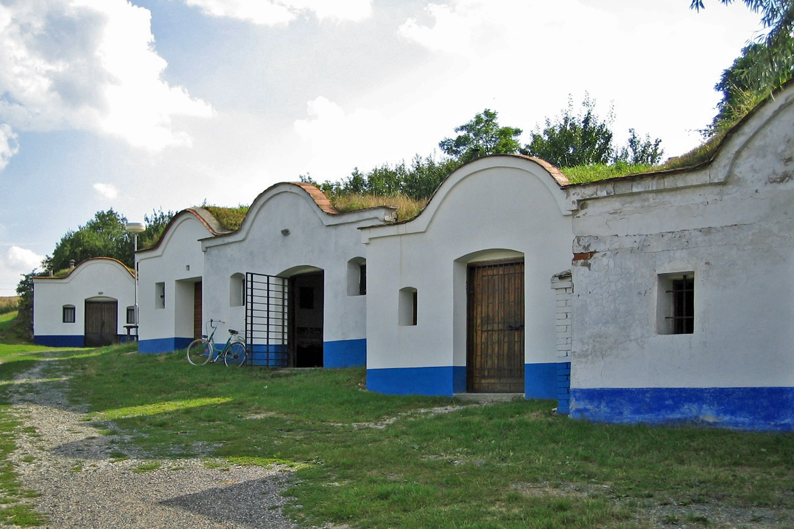 Wine cellars in Petrov (Hodonin district)